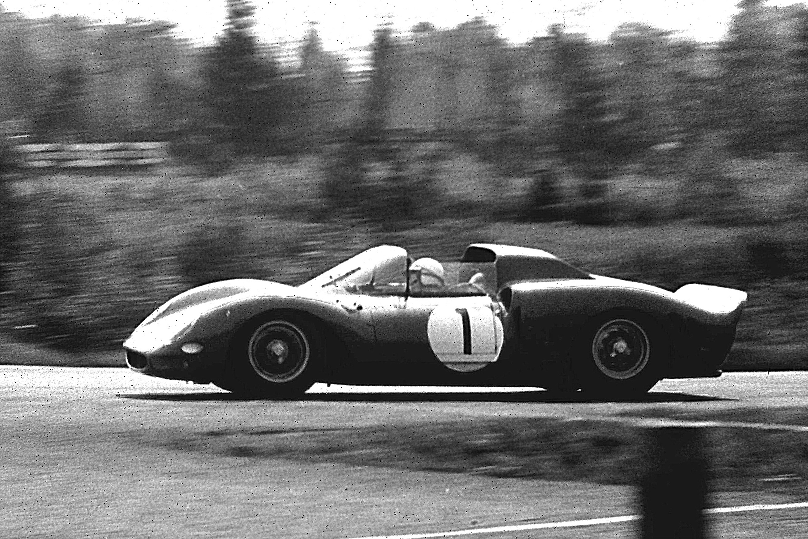 John Surtees im Ferrari 330 P2 beim 1000-km-Rennen auf dem Nürburgring, ausgangs Südkehre